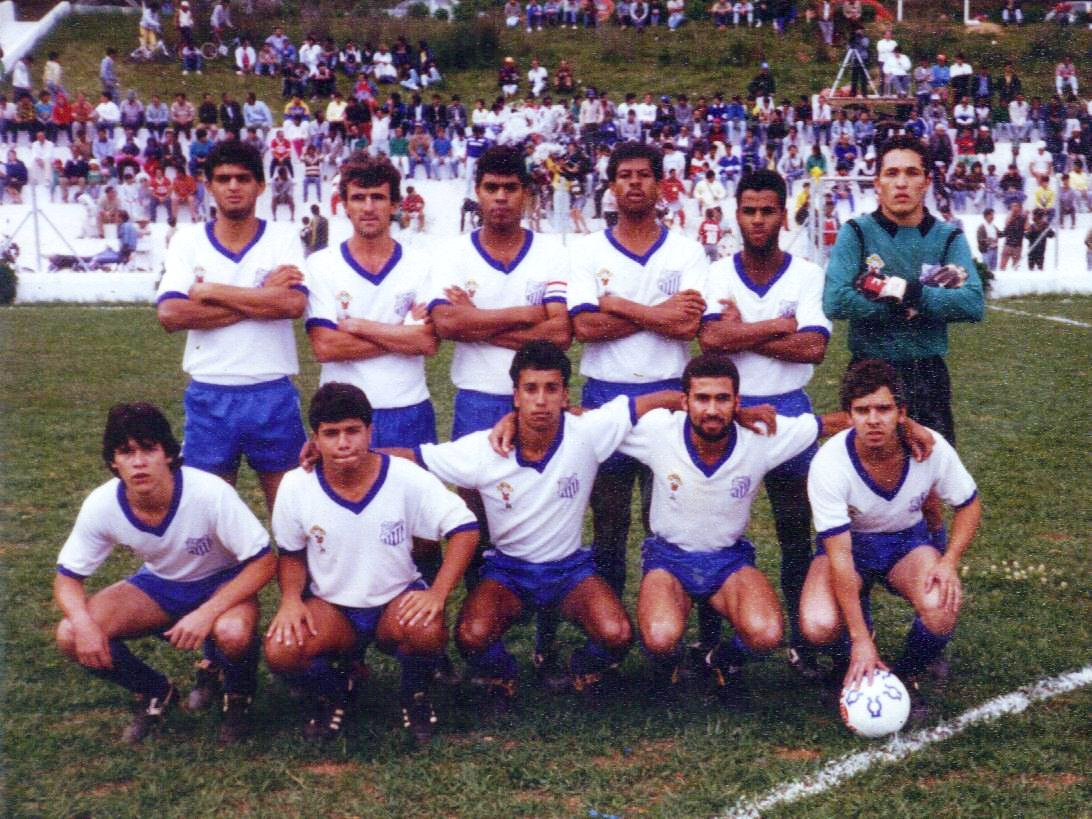 Central Brasileira de Cotia X Guapira. Campeonato Paulista de Futebol Profissional da 3ª Divisão em 1988.